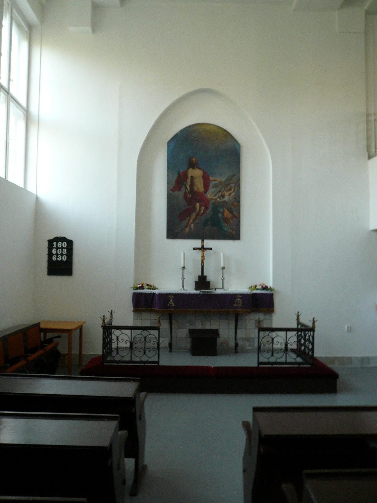 Diakonissenheim in Preßburg (Bratislava)